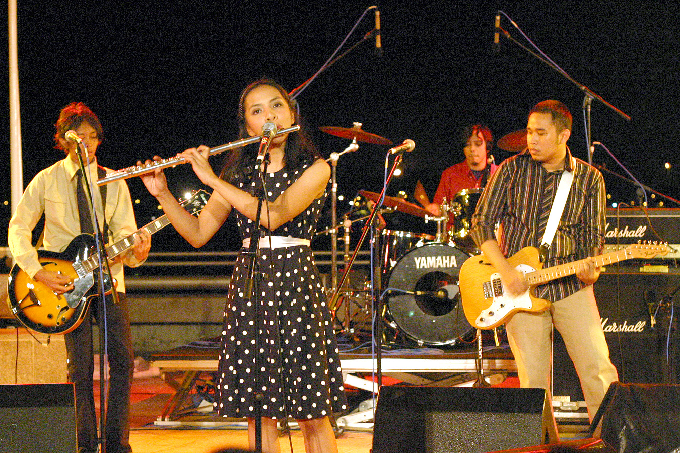 Mocca Concert 4 February 2005 in Esplanade, Singapore